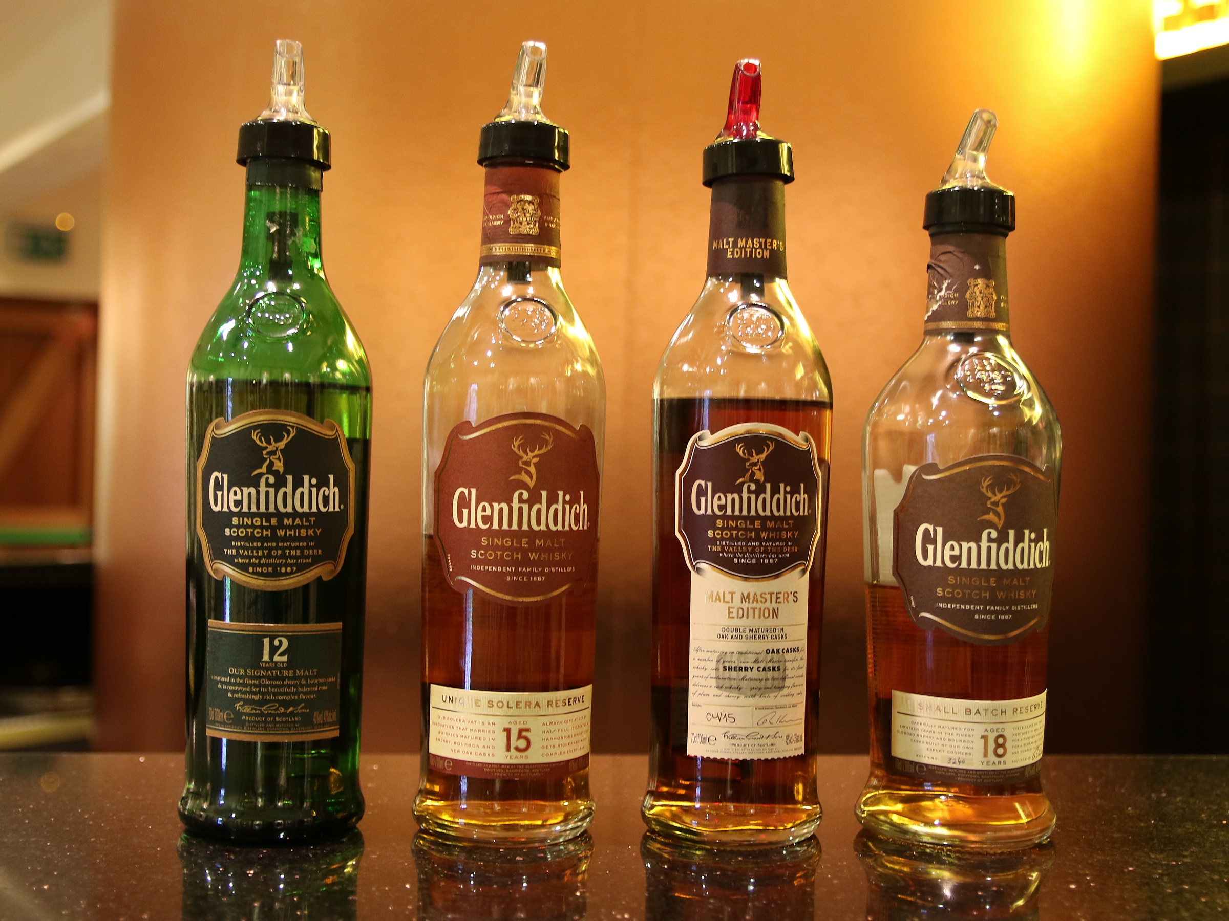 Gängige Produkte der Firma Glenfiddich